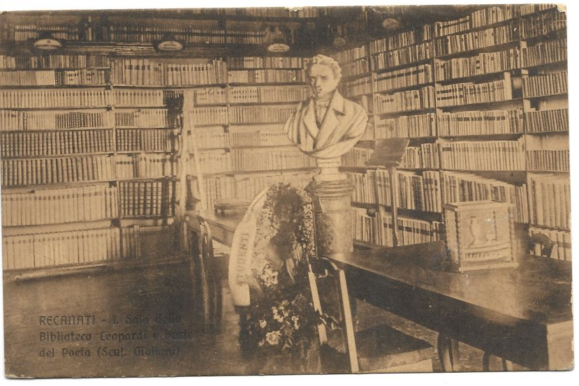 Recanati - La sala della Biblioteca con il busto del Poeta (scultore Giuliani)